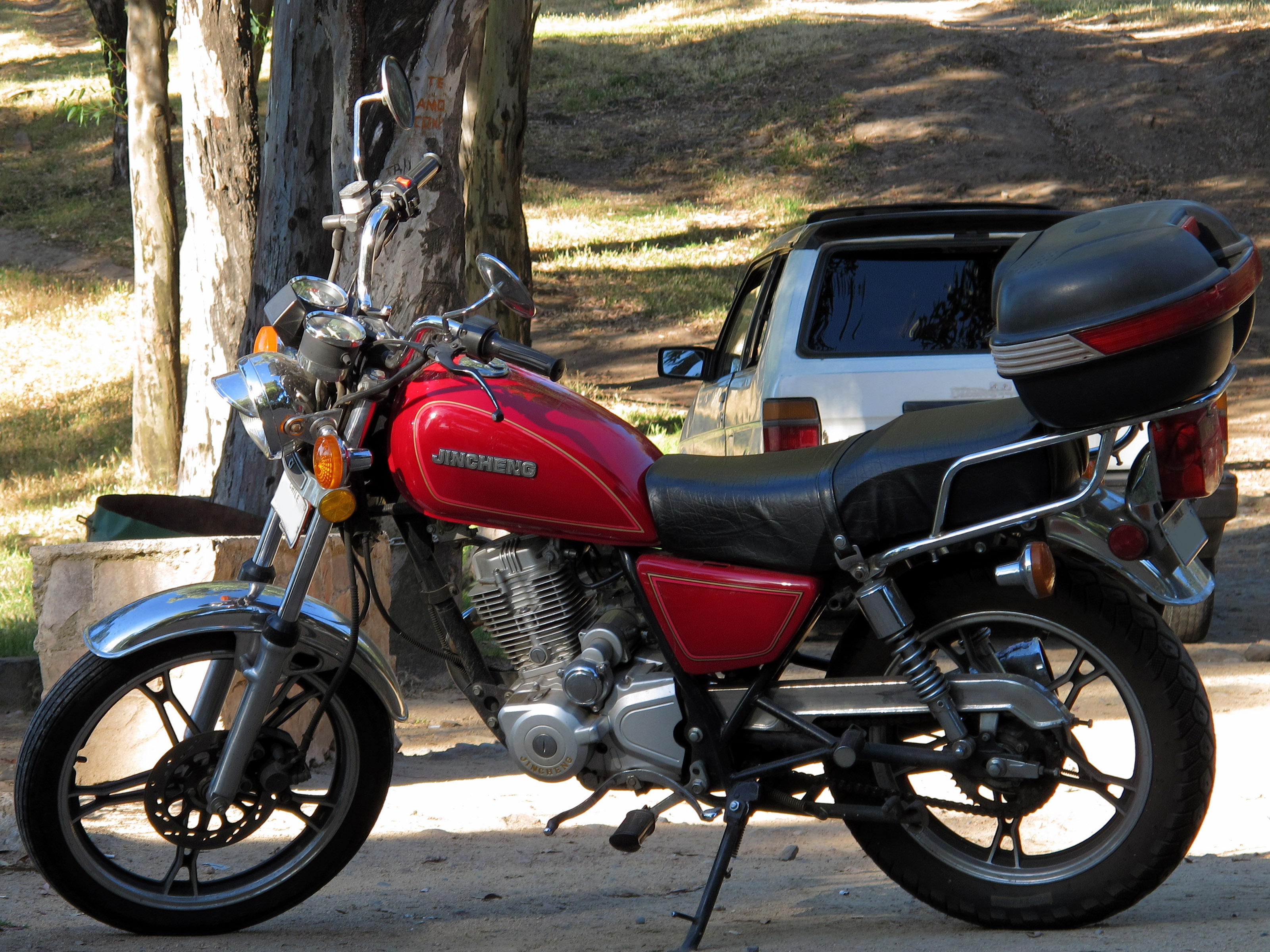 Jincheng JC 150-18 2010